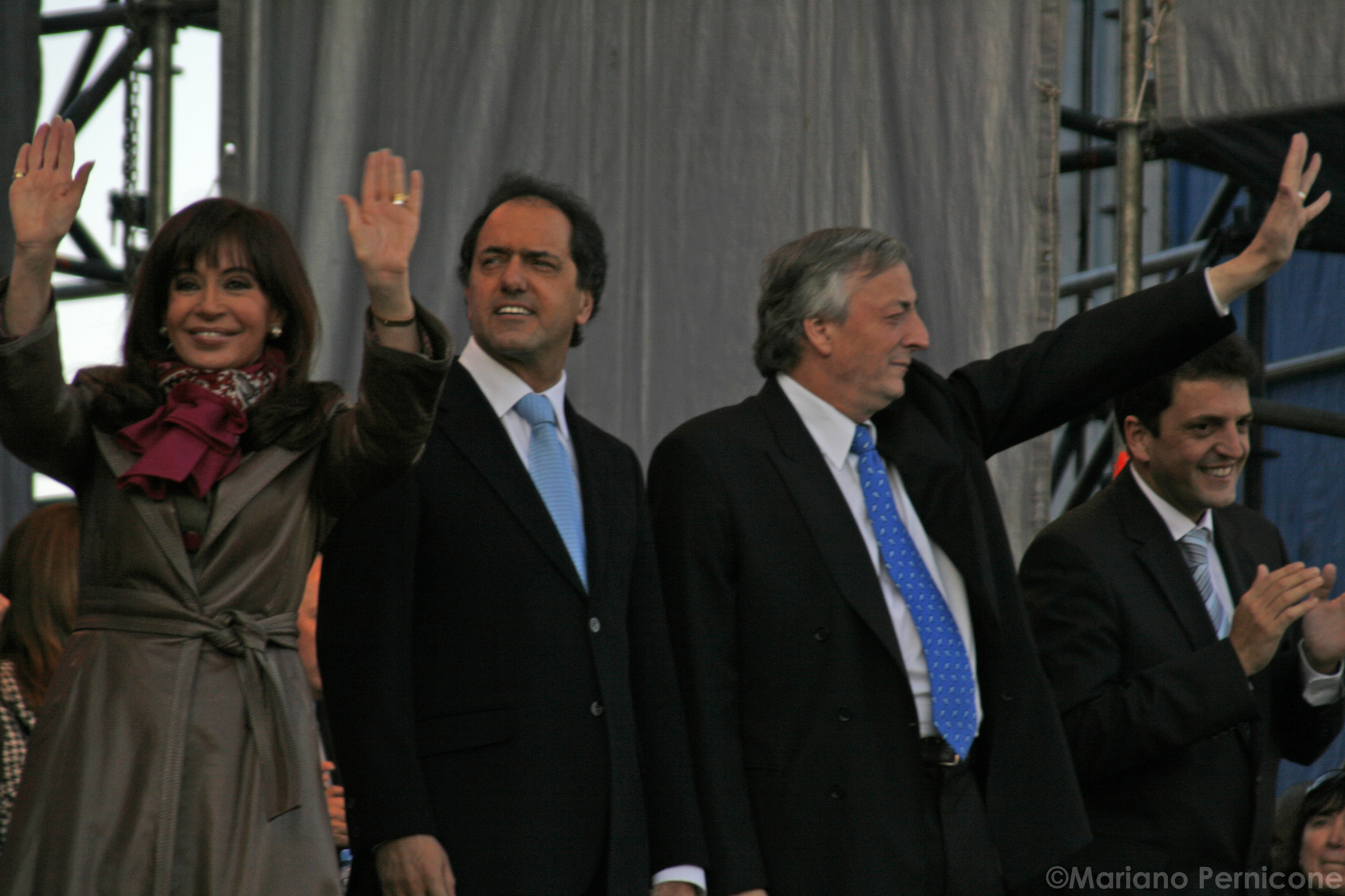 Cierre de Campaña en el Mercado Central de Buenos Aires - La Matanza